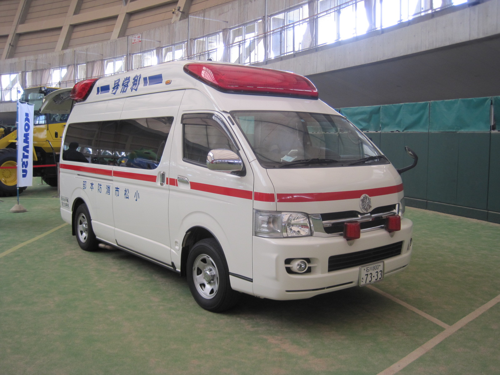 小松市消防本部のトヨタ・ハイメディック。小松の街を開府した前田利常から「利常号」という愛称が付けられている。